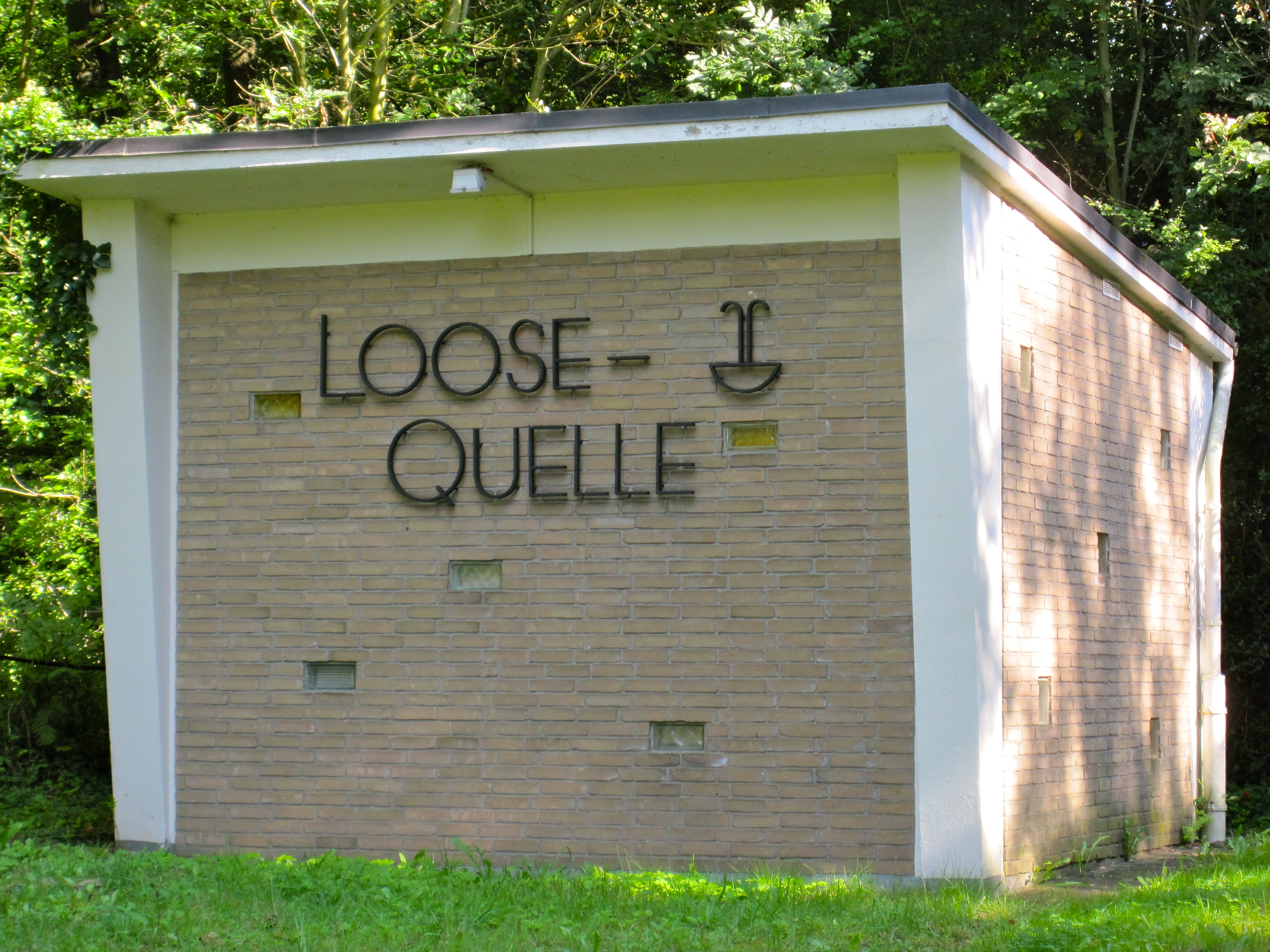 Brunnentempel über der Loosequelle in Bad Salzuflen